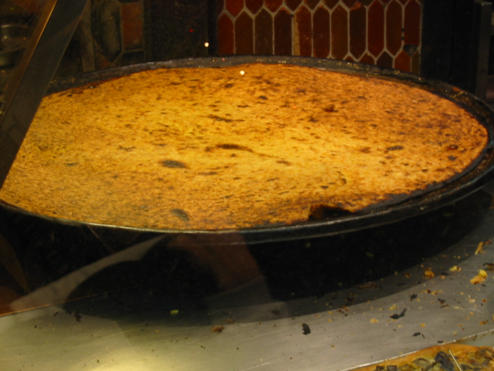 Plaque de socca sortant du four.